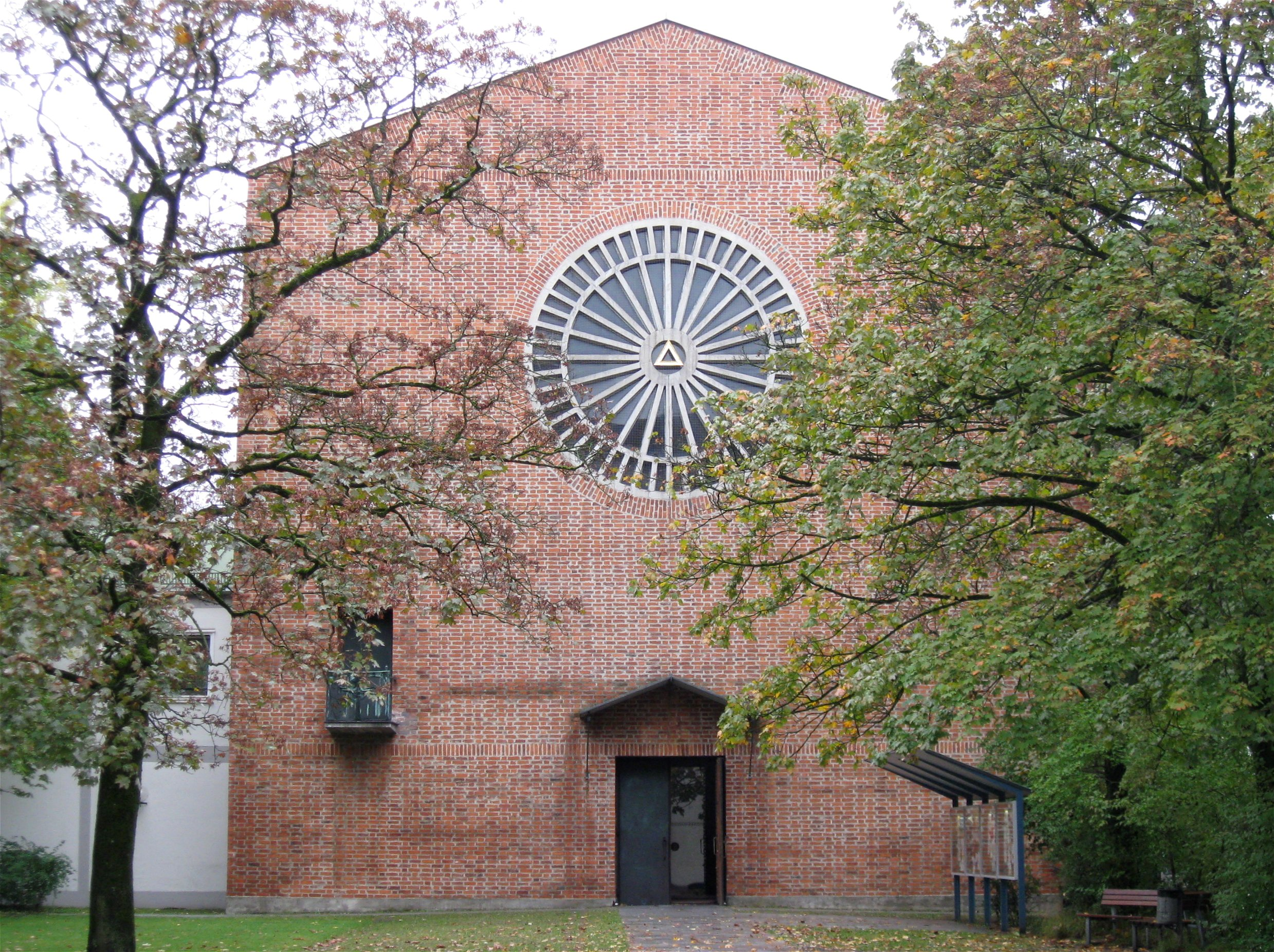 München, Hörwarthstraße 1; Kath. Pfarrkirche und Kirche des Konvents der Augustiner- Eremiten Maria vom Guten Rat; hoher, schlichter Sichtziegelbau mit Satteldach, durch Freiraum von der Straße abgerückt und mit am Gehsteig errichtetem Glockenständer; Nordfassade mit Betonrosette und Außenkanzel; betont nüchterner Sakralbau, der alle konstruktiven Elemente sichtbar zeigt; im Inneren weite Längshalle; die durch Stahlbeton-Stützen ausgesteiften Längswände, mit verschlämmten Ziegeln ausgefacht, tragen die Hängekonstruktion des offenen Holzdachstuhls; 1956/57 von Josef Wiedemann; mit Ausstattung.